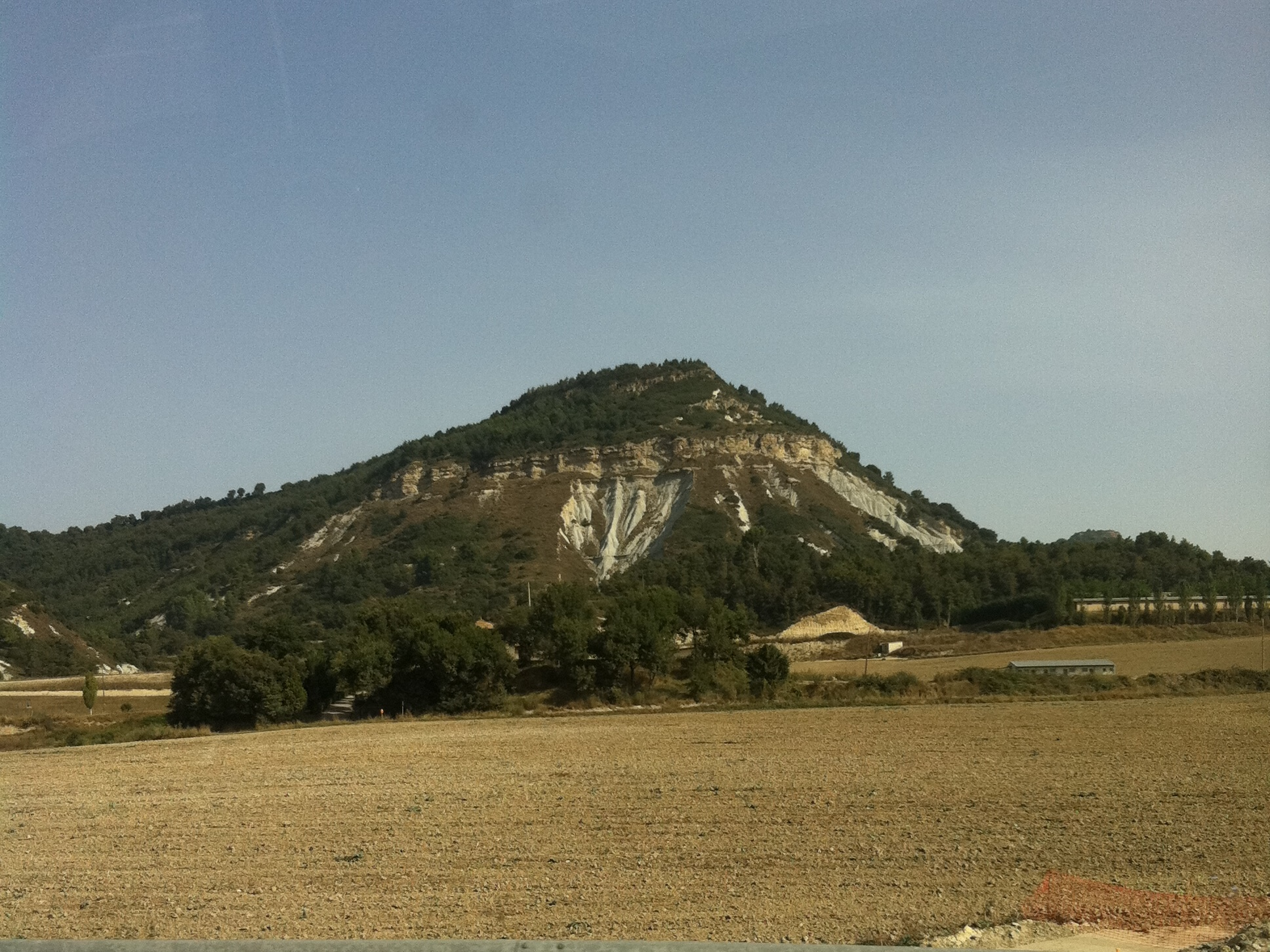 Serrat del Portell des de la C-25